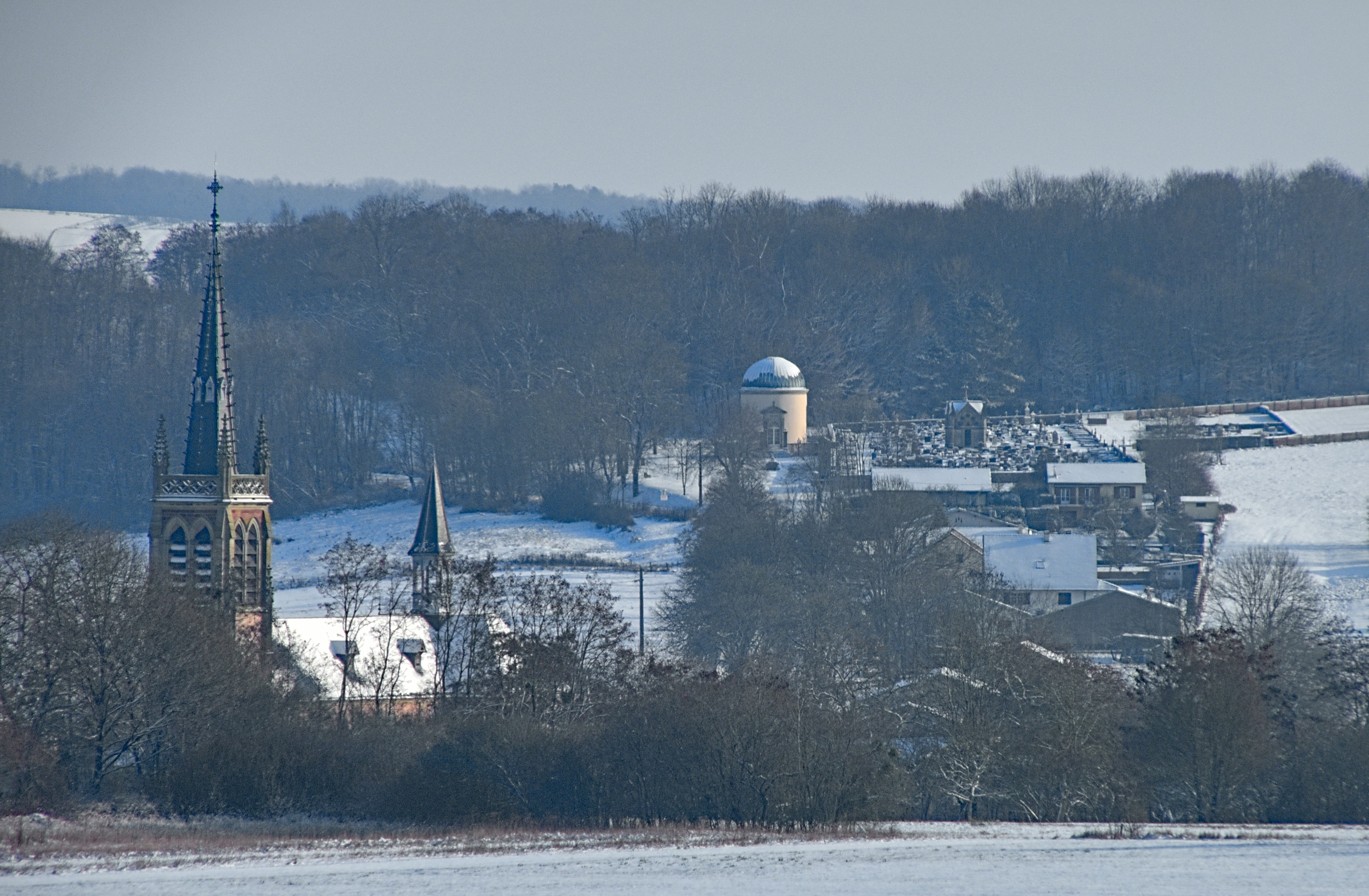 Vue de Mattaincourt, sa basilique et son cimetière, sous la neige.